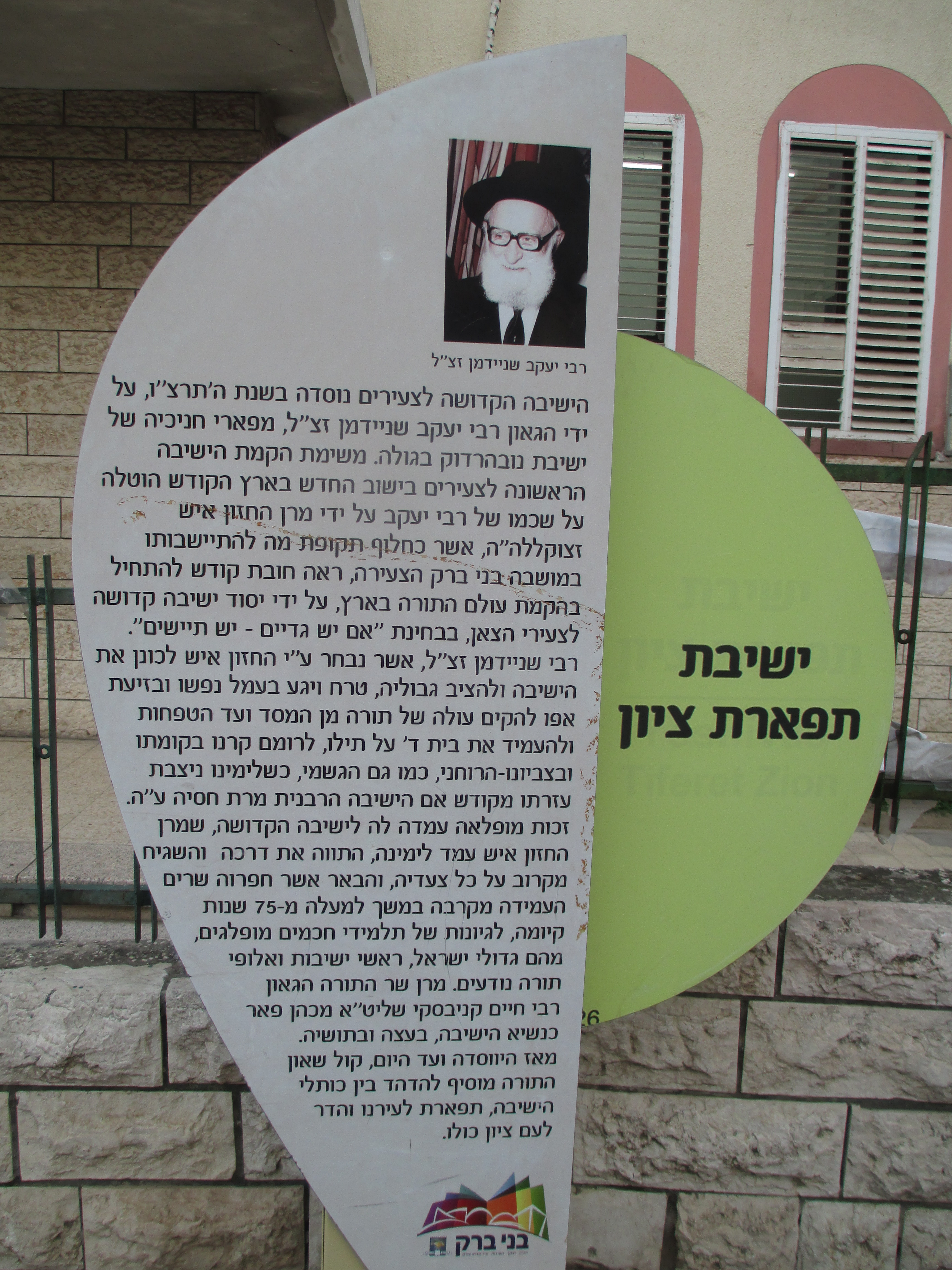 שלט הסבר בחזית ישיבת תפארת ציון ברחוב ירושלים 37 בבני ברק